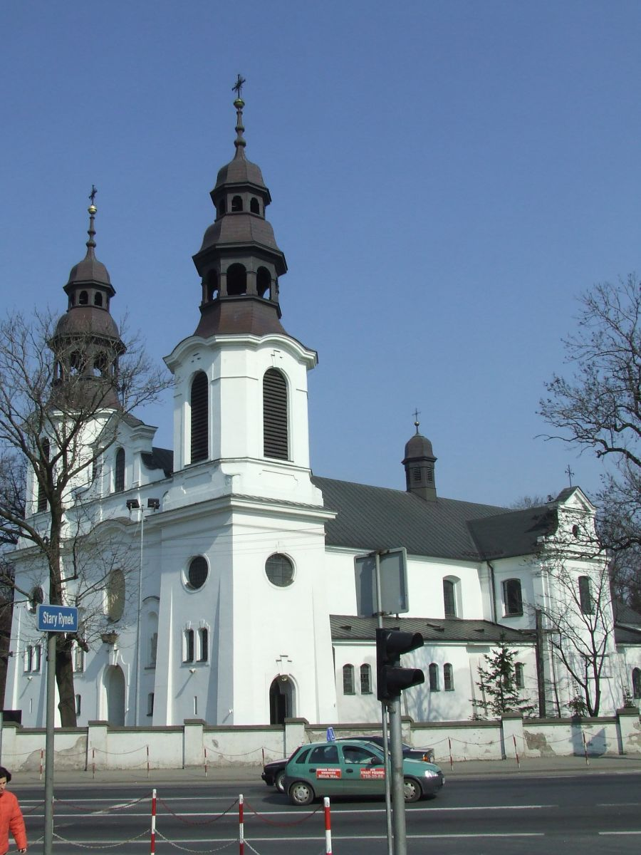 Mińsk Mazowiecki, kościół parafialny Narodzenia NMP z XVII w.